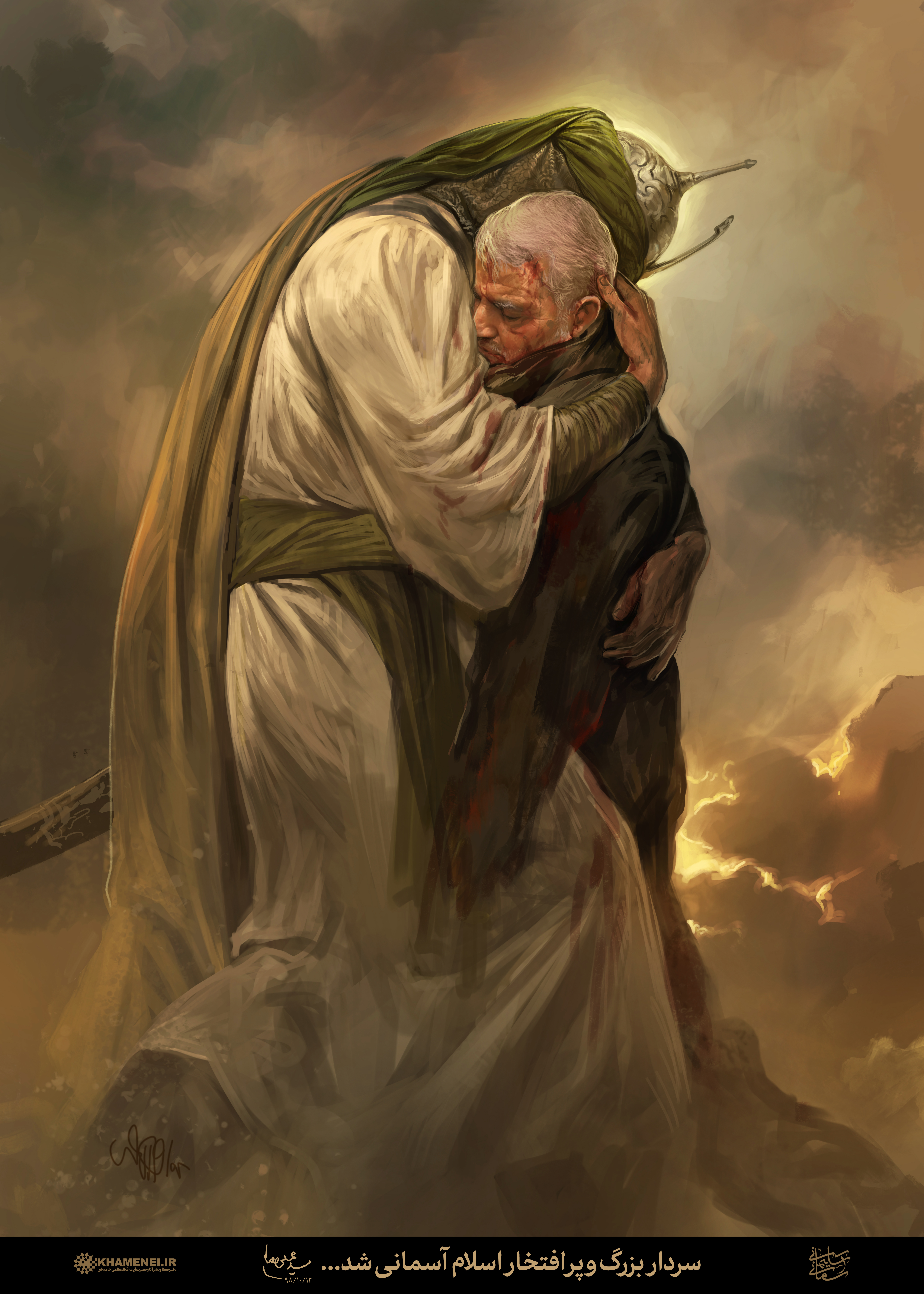 قاسم سلیمانی در آغوش حسین بن علی. این تابلو «اصحاب آخرالزمانی اباعبدالله» نام دارد.